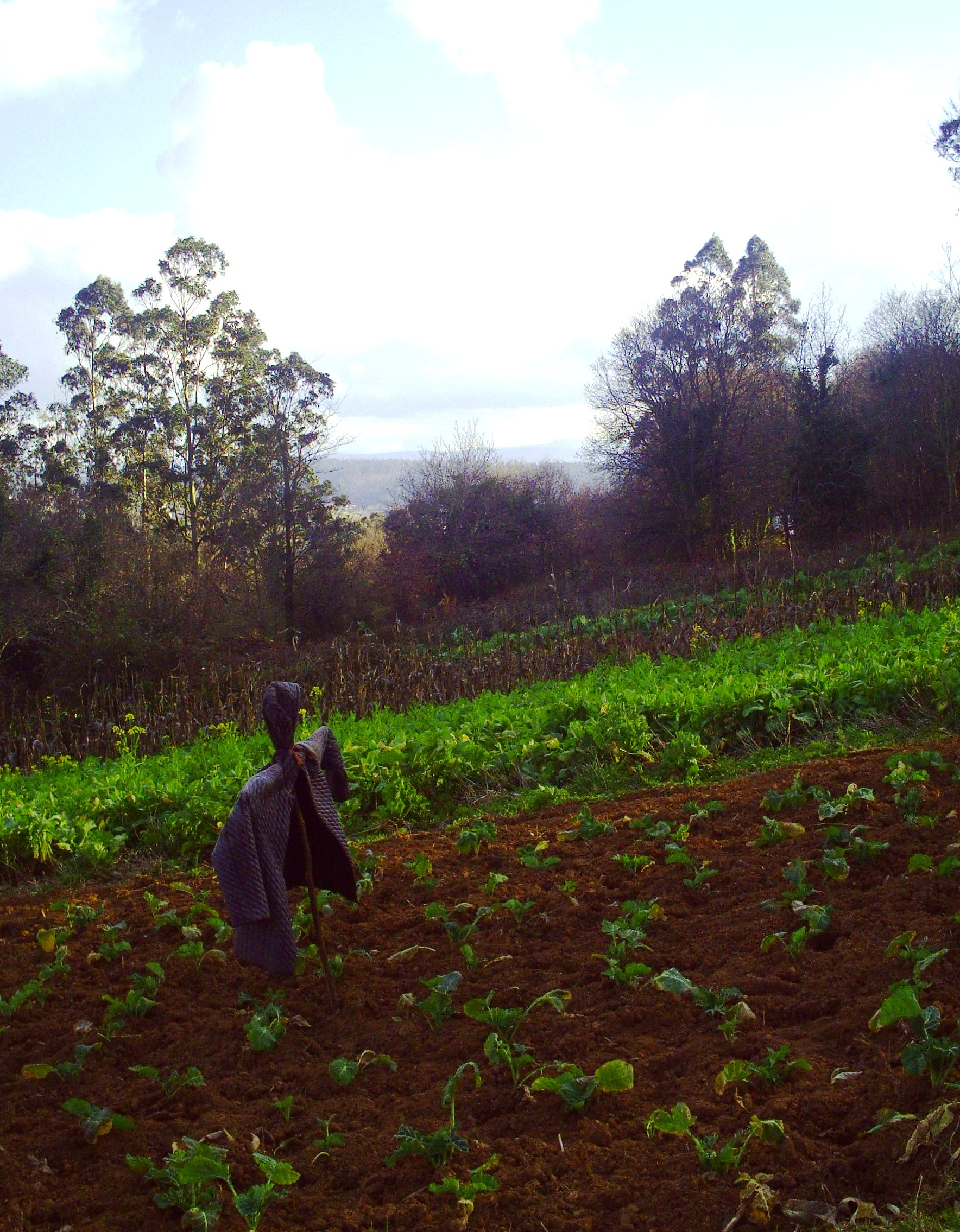 En Angrois no hubo concentración parcelaria